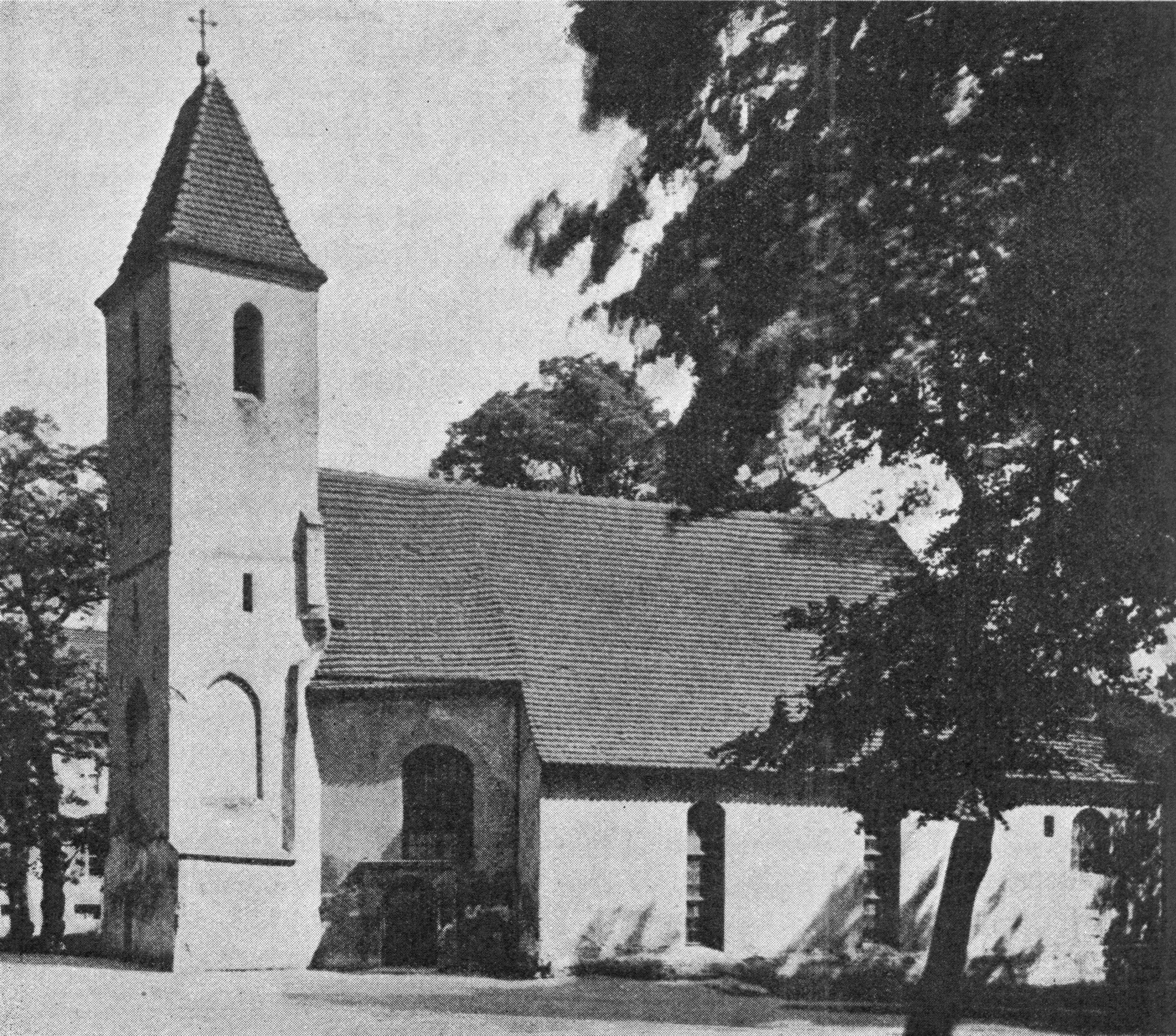 Abb. 28. Die ehemalige Getraudenkirche. Ansicht von Südwesten.